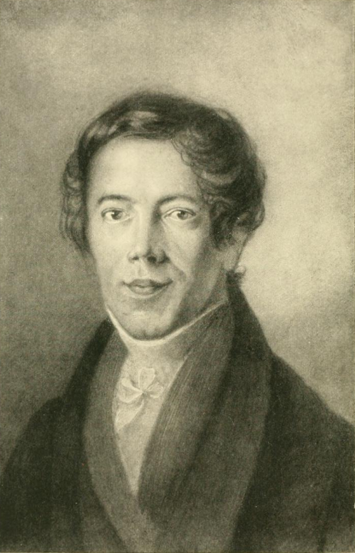 Porträt Friedrich Adolf Ebert, verkleinerter Lichtdruck 1910 einer Kreidezeichnung von 1827